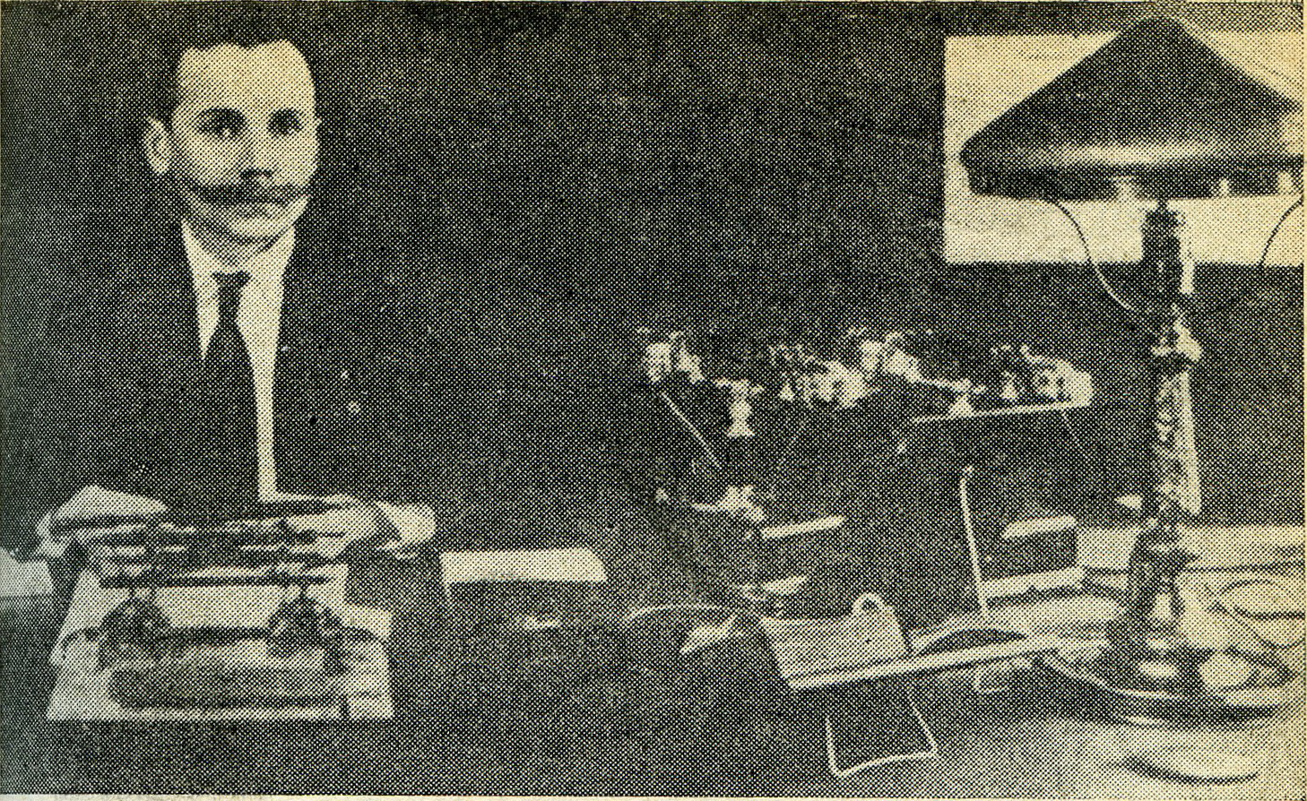 Иван Яковлевич Яковлев - первый красный директор завода "Эрикссон" (впоследствии "Красная Заря") в Петрограде, Россия.